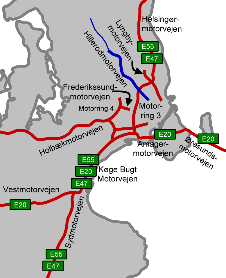 Map of Hillerødmotorvejen in Copenhagen